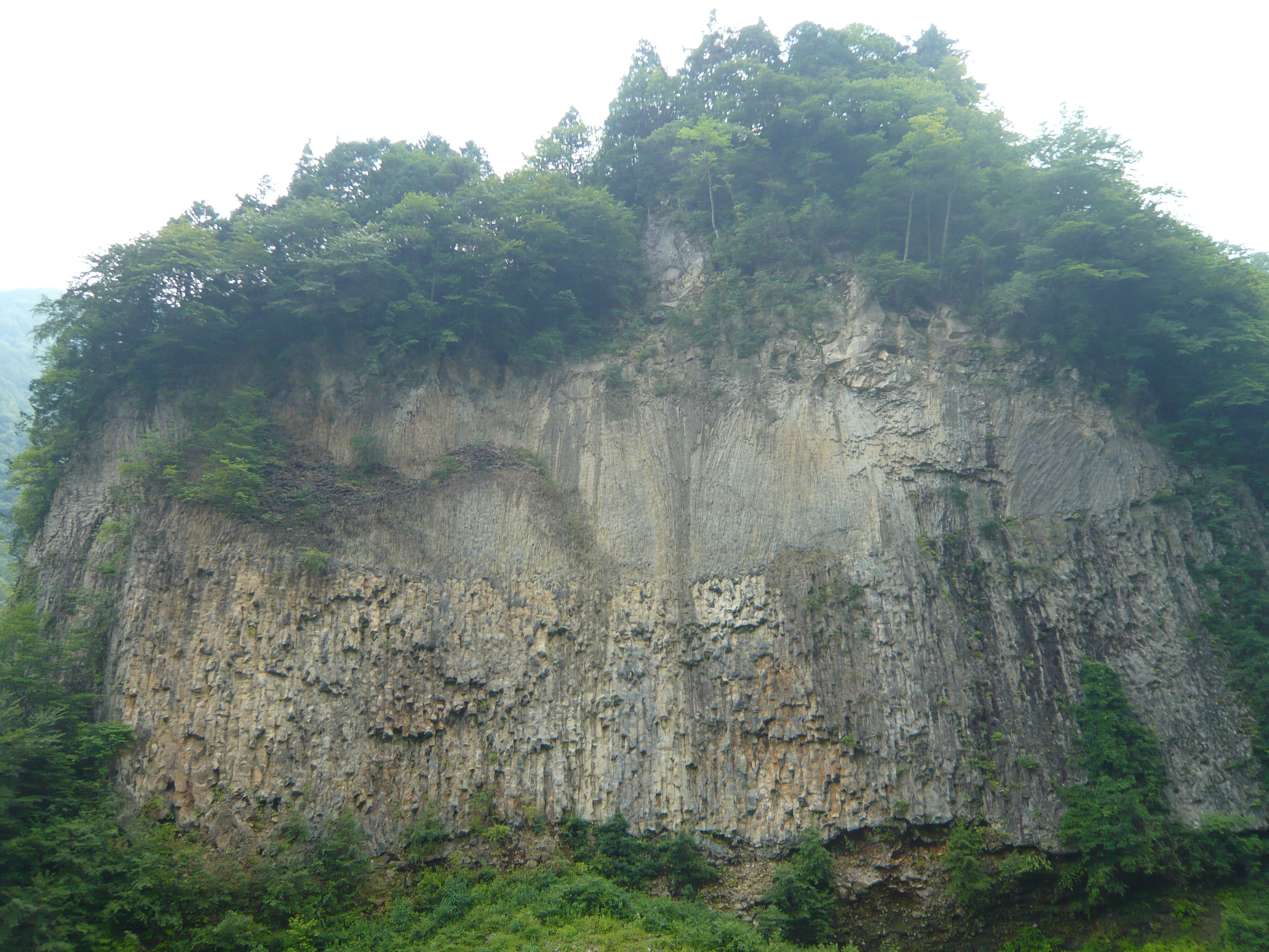 巌立。岐阜県下呂市小坂町下島温泉。